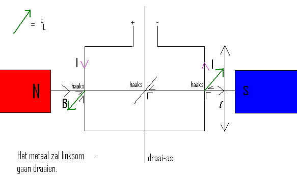 Lorentzkracht afbeelding voor bij het gelijknamige artikel, Bij bijbehorende tekst